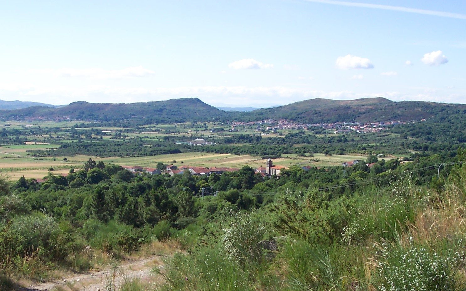 Pazos, Codosedo, Sarreaus